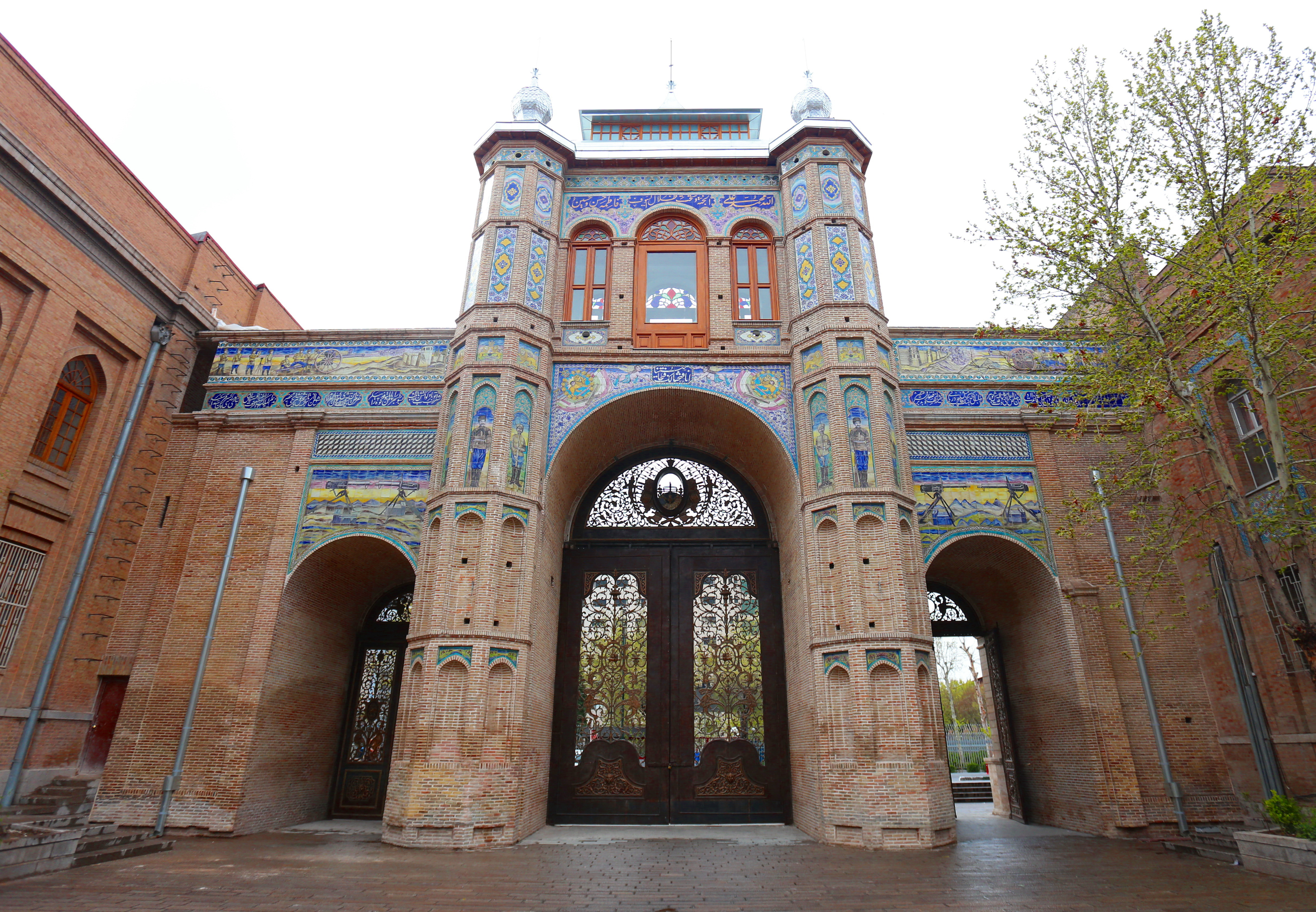 سردر باغ ملی